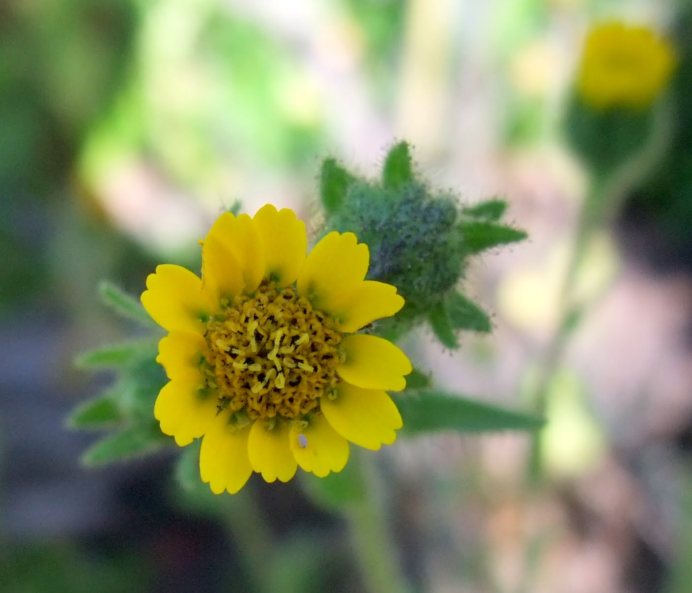 Holocarpha macradenia; Santa Cruz Tar Weed